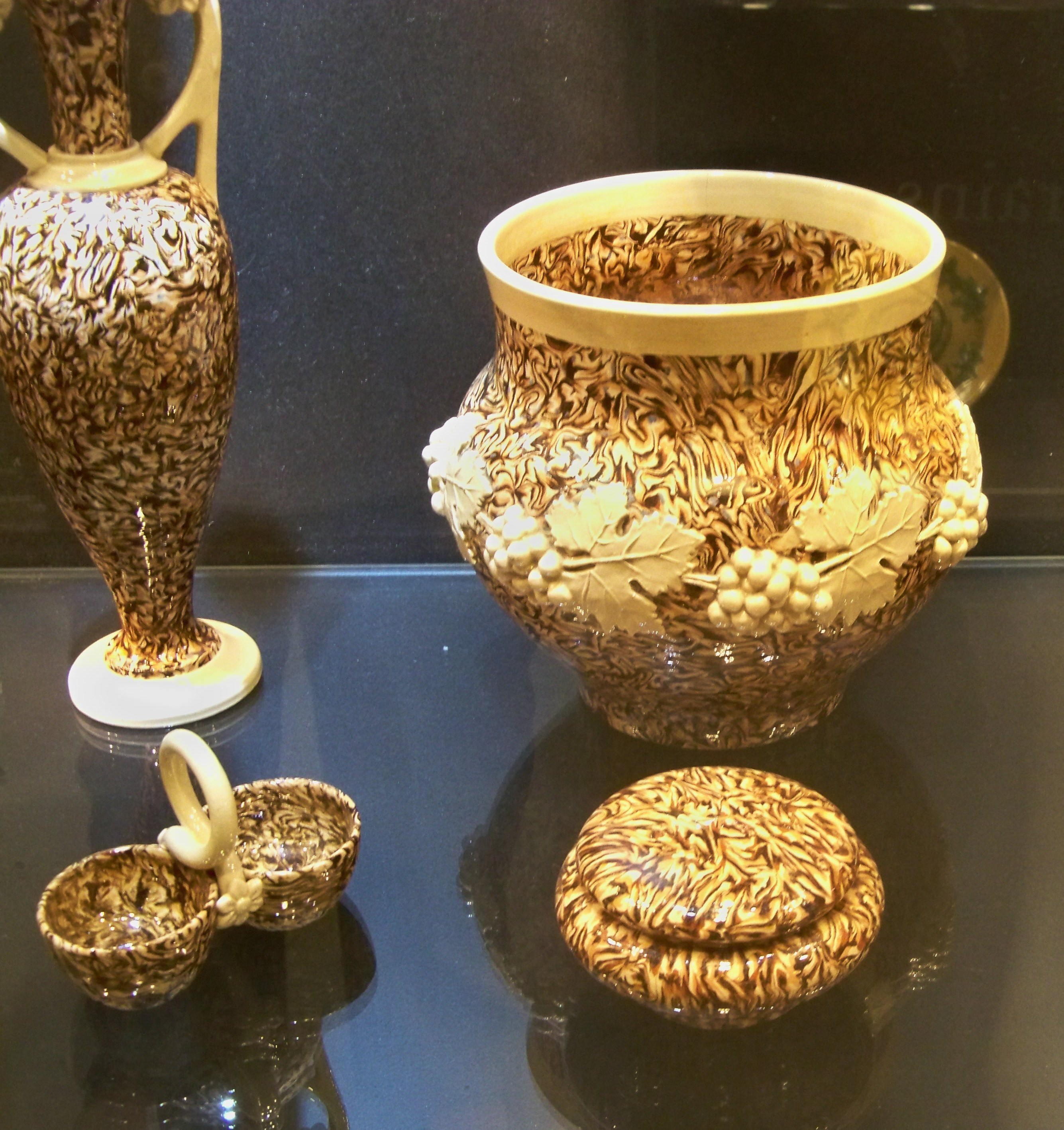 faience flammée d'Apt (84)